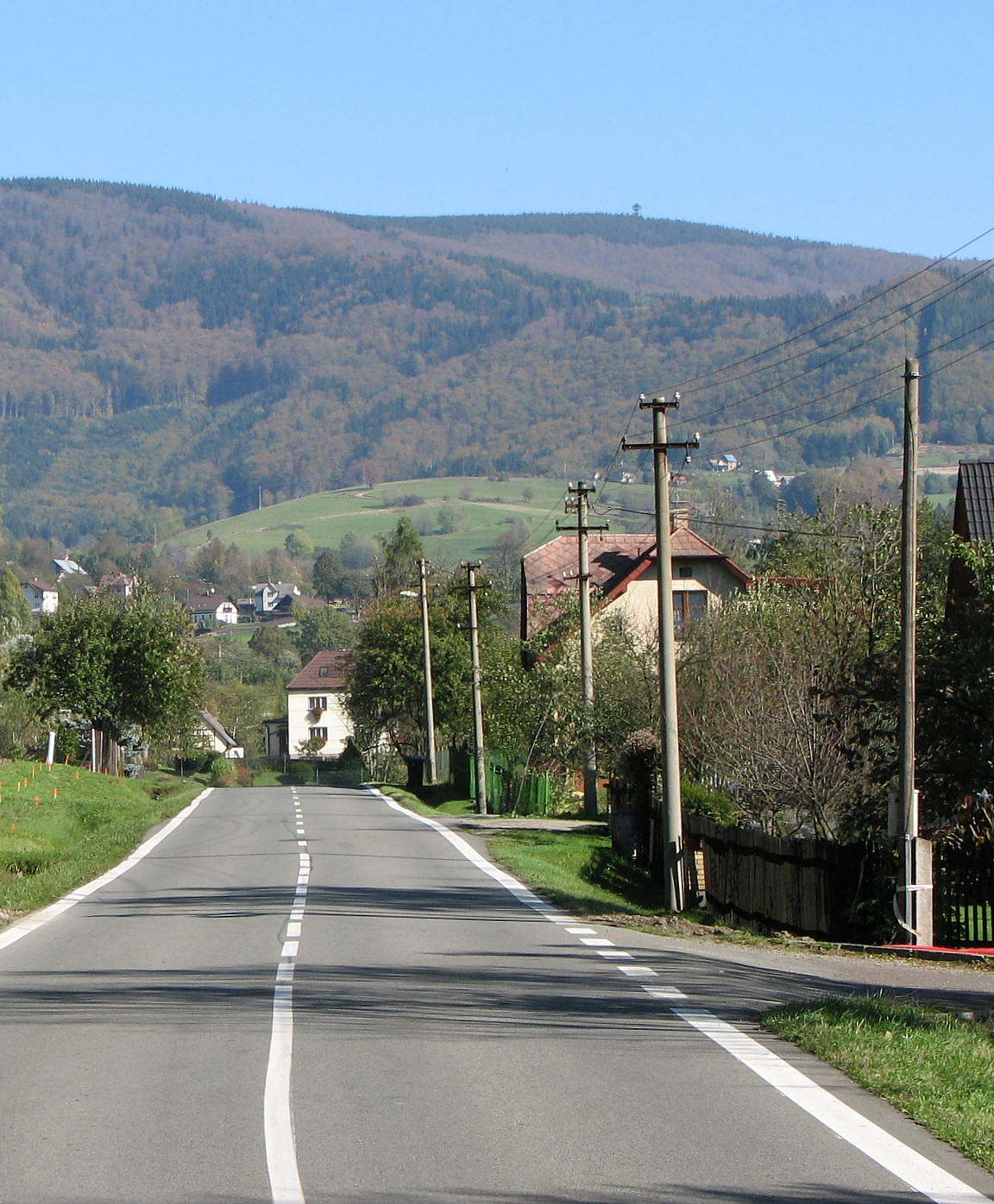 Czantoria Wielka, Beskid Śląski